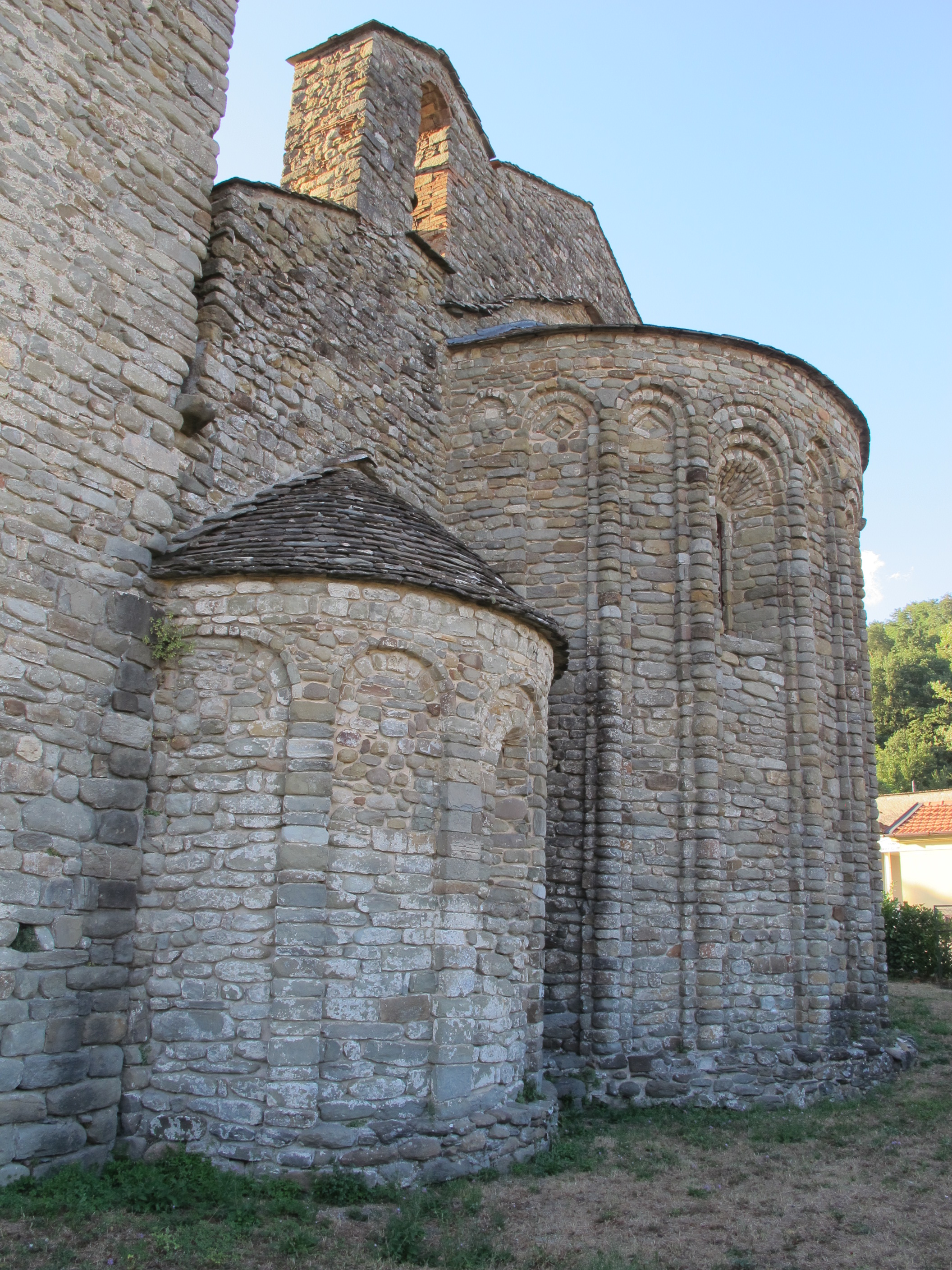 Pieve di sorano